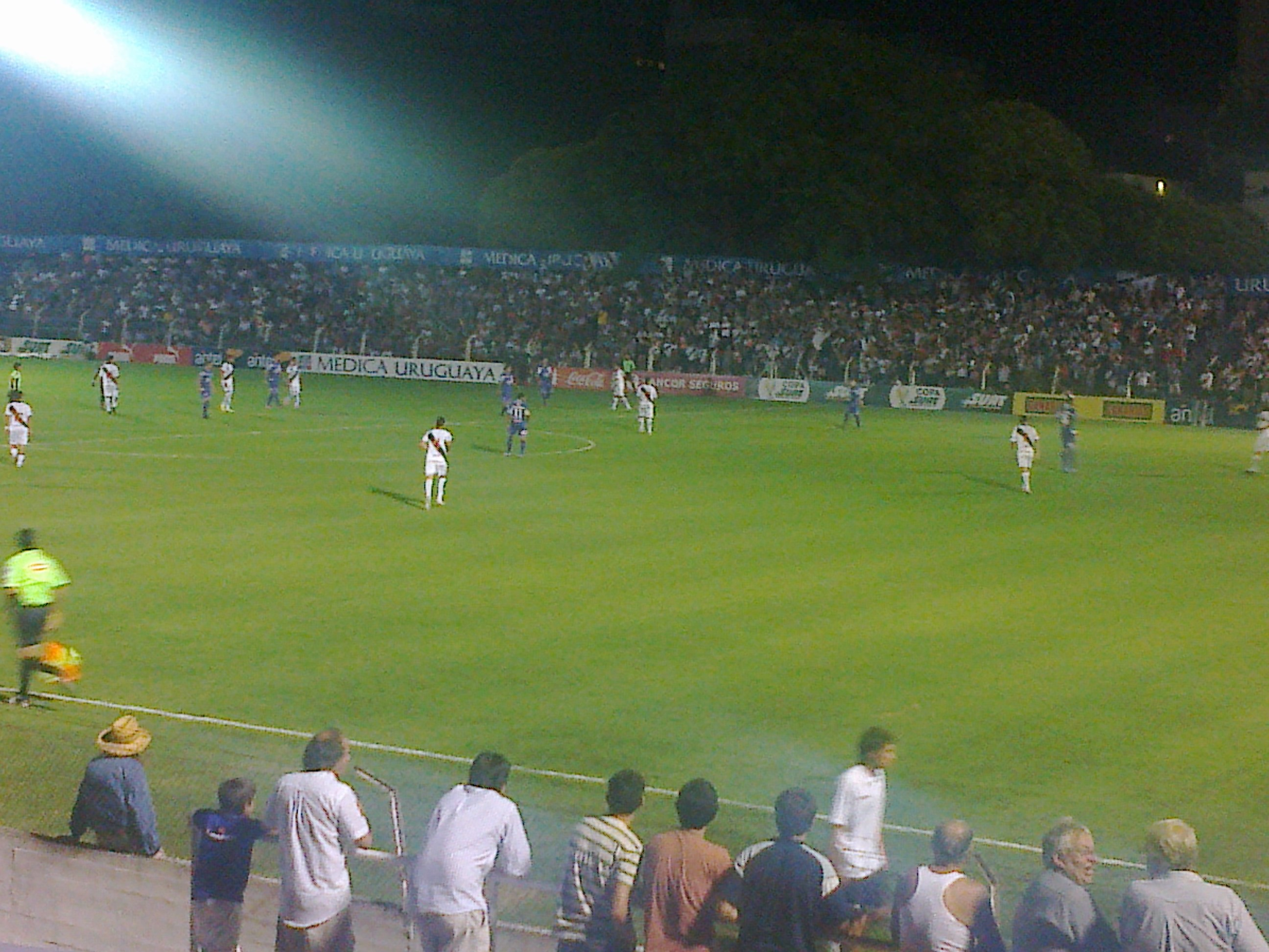 Clásico de los medianos, Defensor vs Danubio, en el Estadio Franzini de Montevideo, Uruguay. Enero de 2013, Copa Suat.